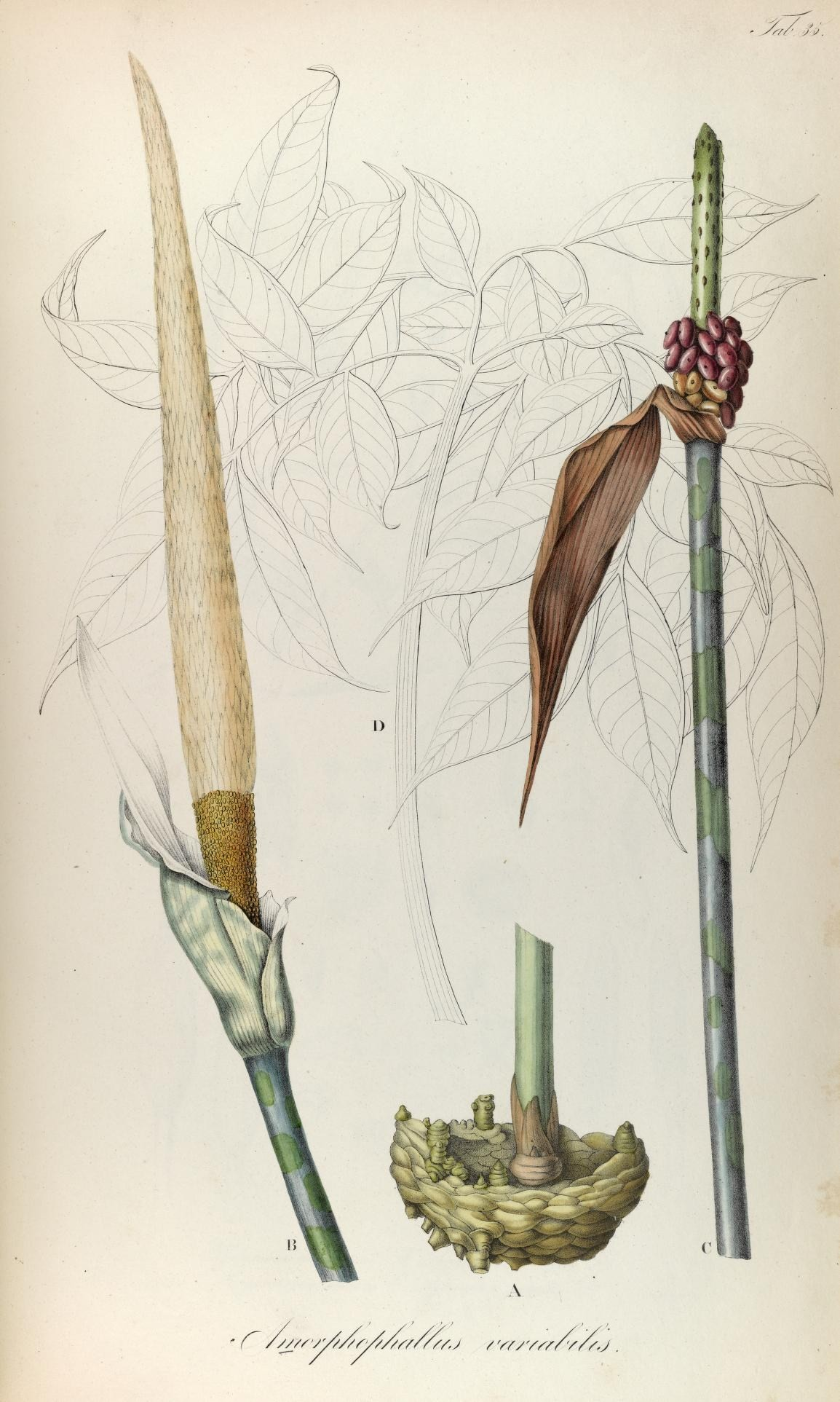 C //s/rs'///.r/f//f////Aj / vry Ysr/f/sj sj.